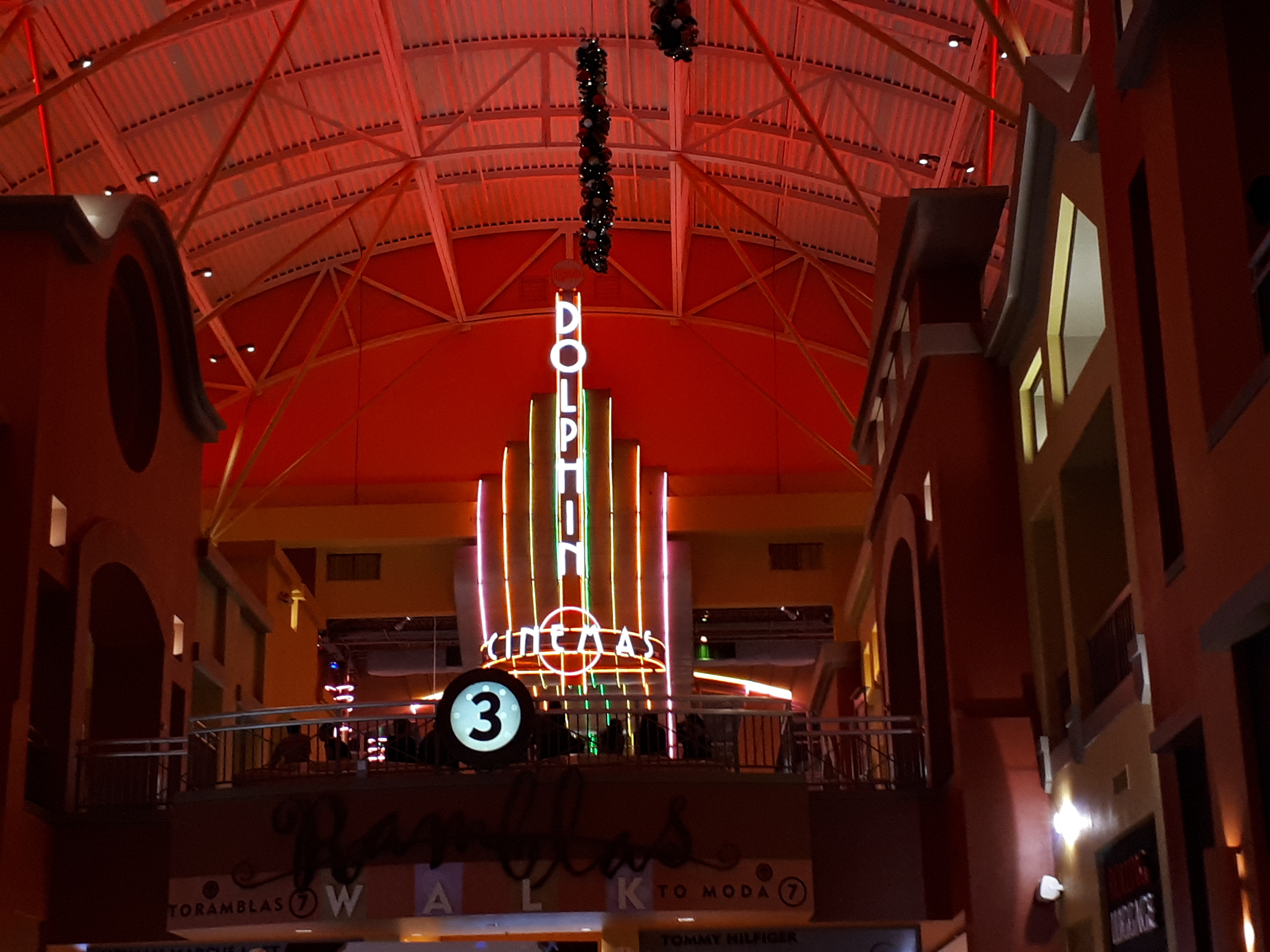 Cobb Dolphin 19 Cinema in der Dolphin Mall in Sweetwater, Florida, im November 2017